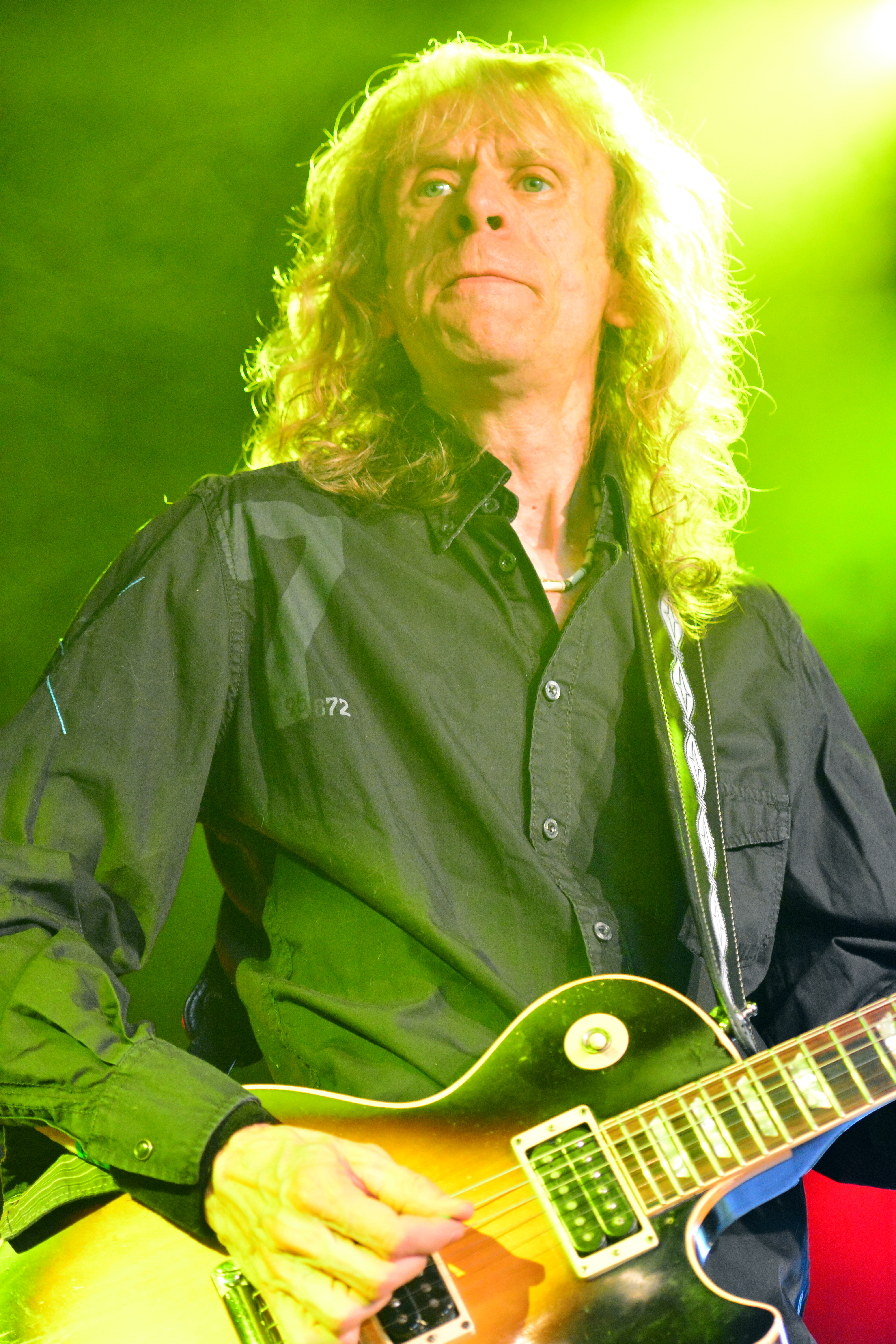 Brain Tatler von Diamond Head beim Headbangers Open Air 2014